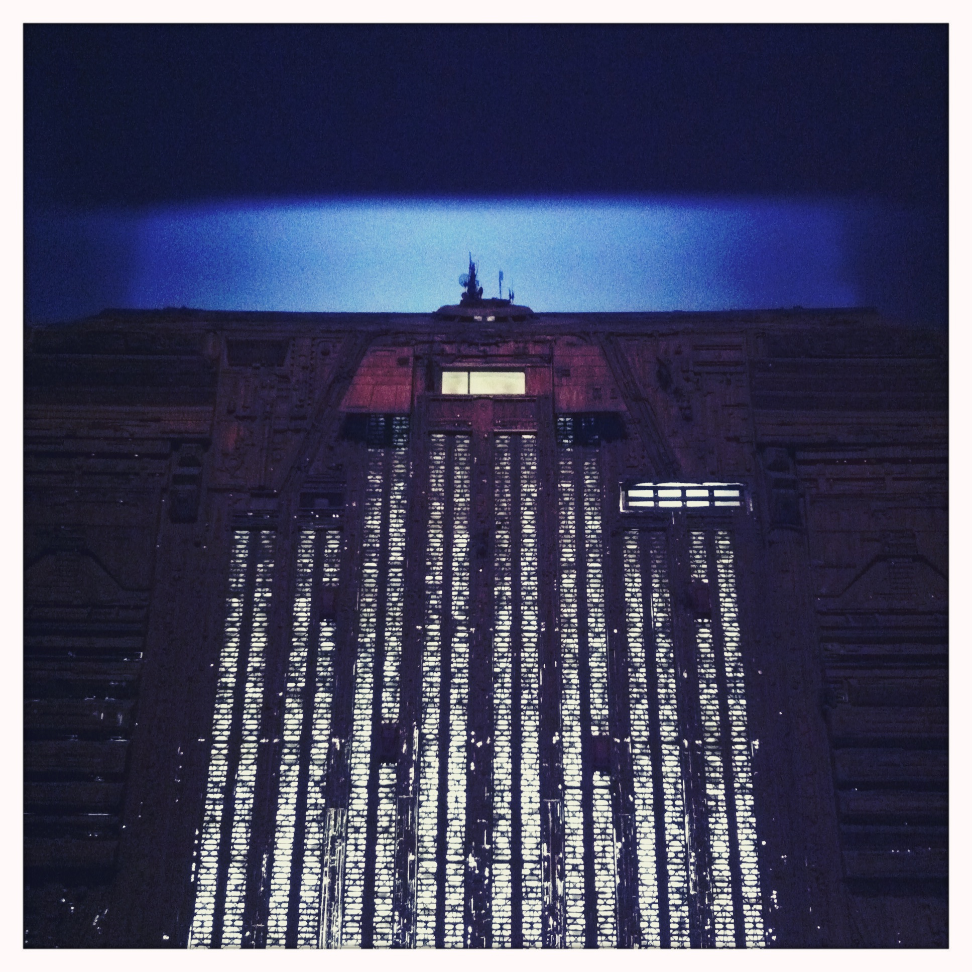 Maqueta usada en el film Blade Runner para recrear las pirámides de Tyrell Corporation. El modelo se expone en el Museum of the Moving Image de Astoria (Nueva York).